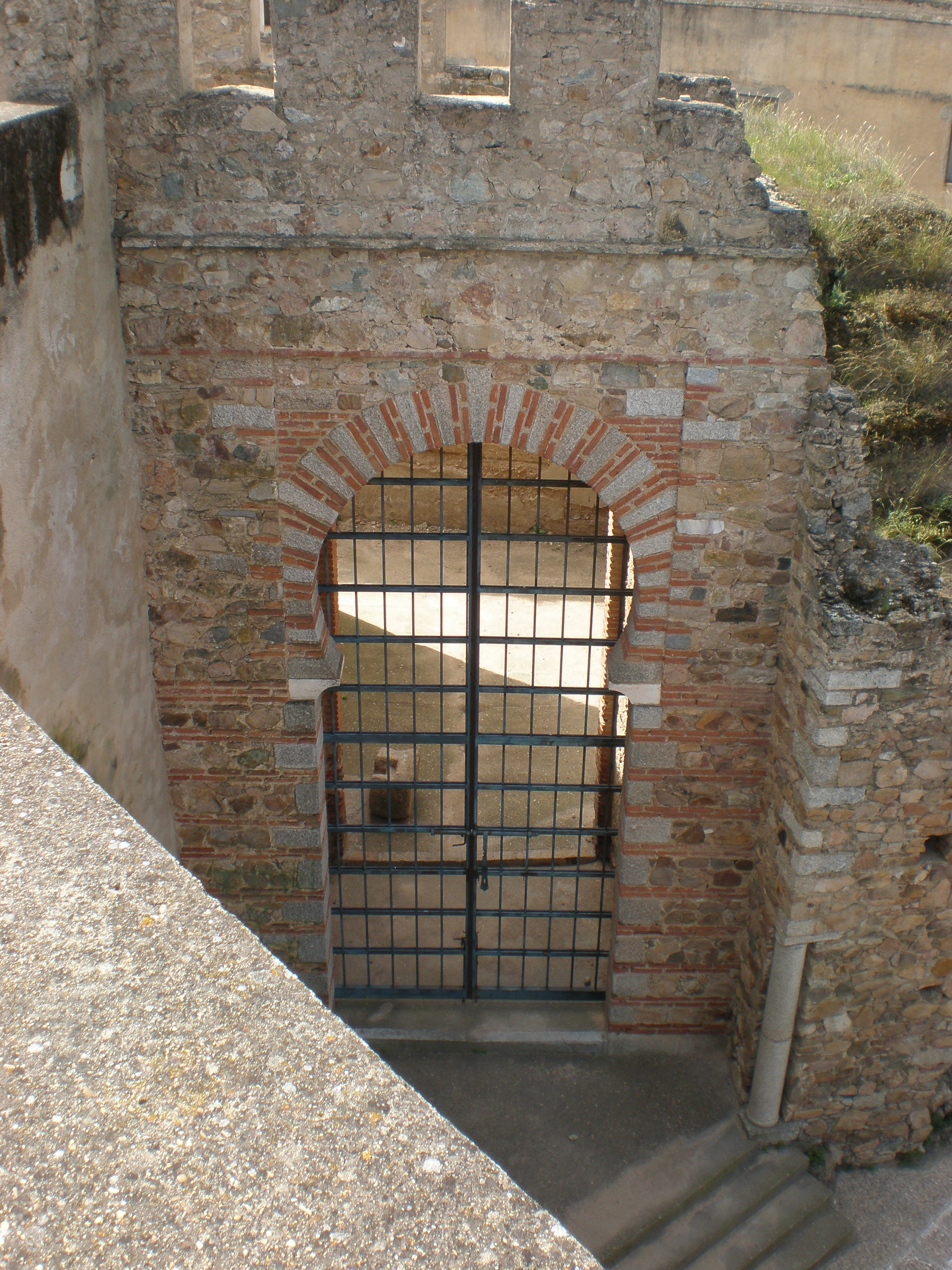 Pordego de Yelves.